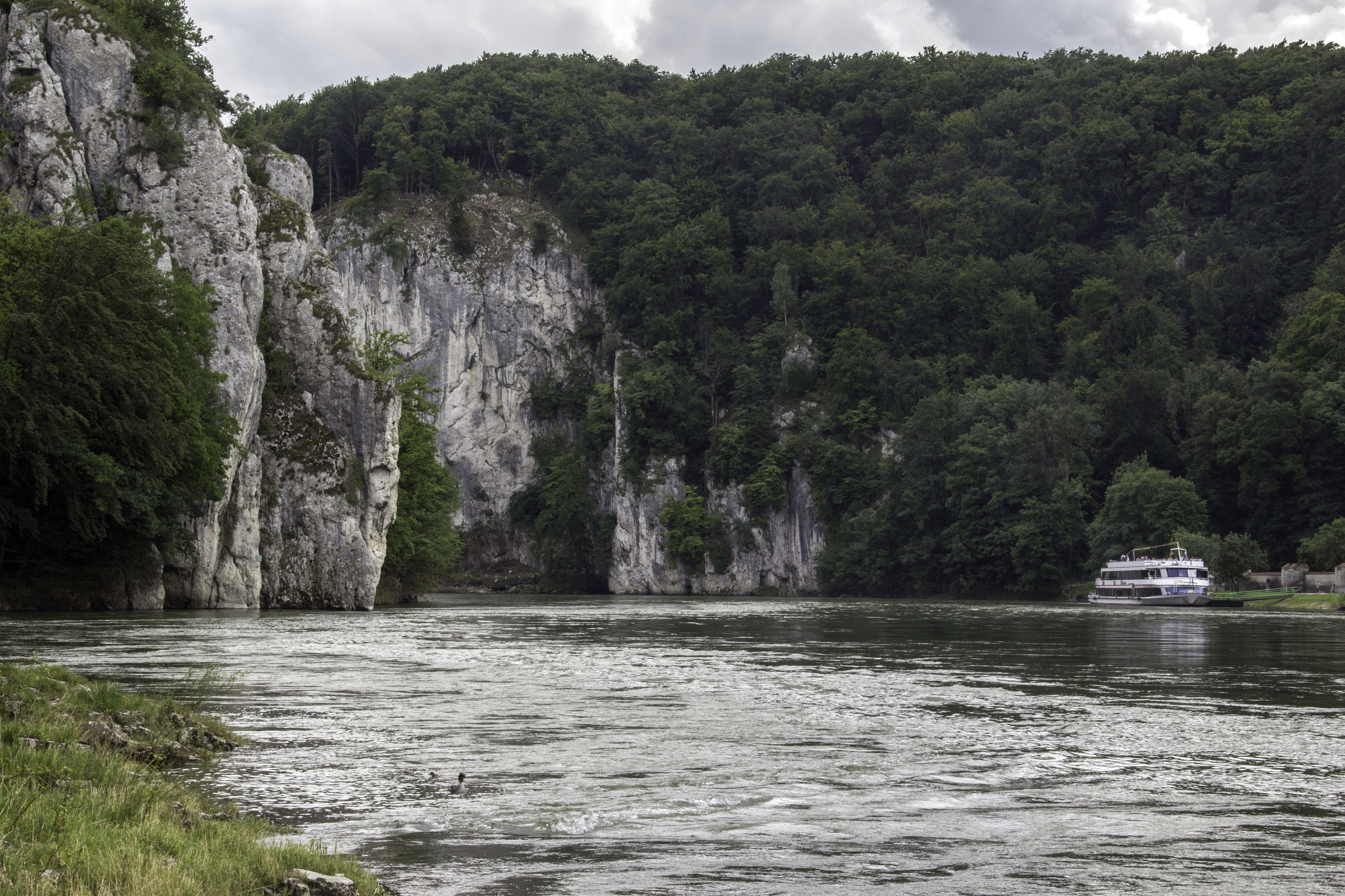 Weltenburger Enge, Donau, Schiff